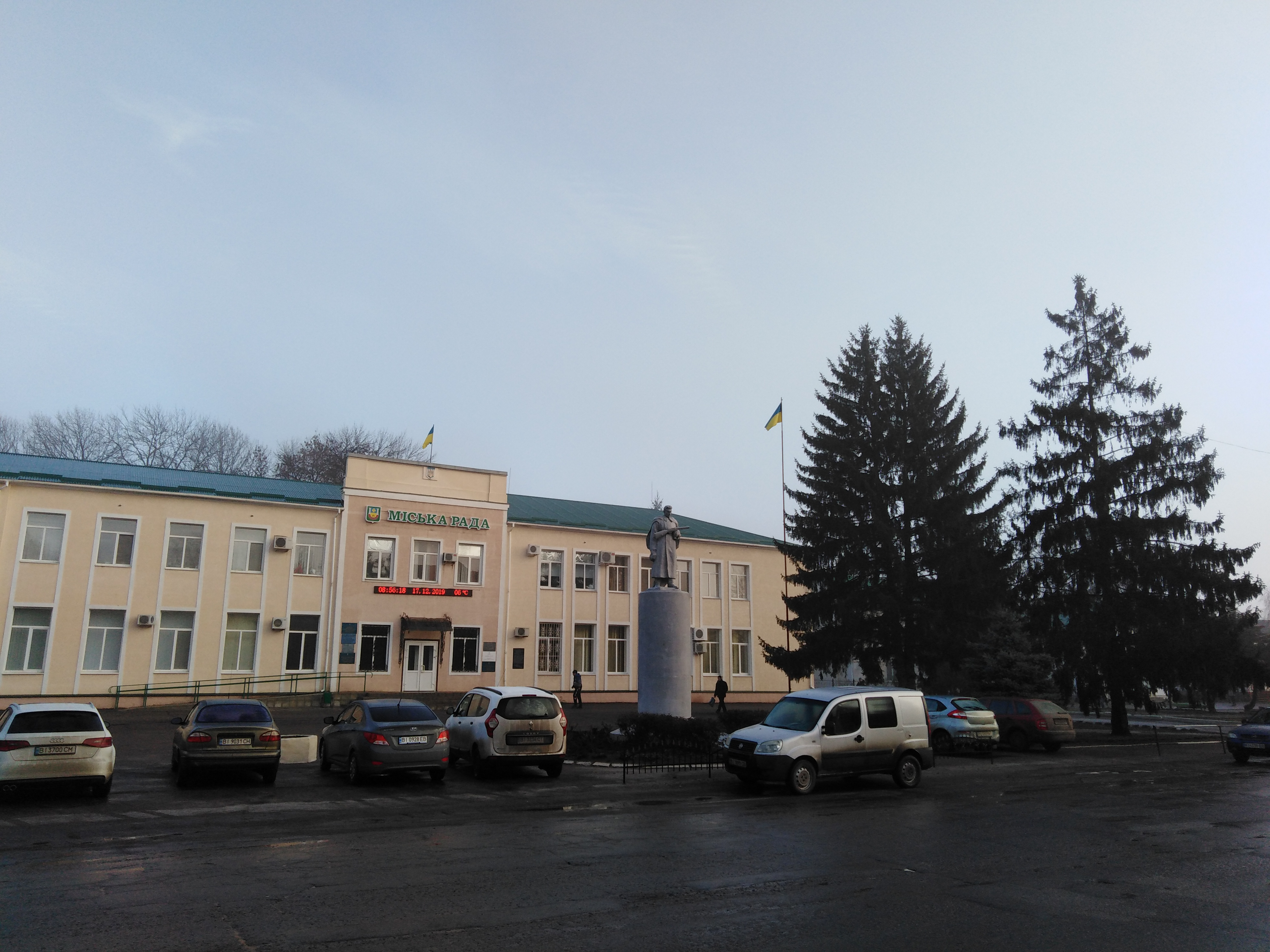 Україна, Полтавська область, м. Карлівка. Міська рада. Вулиця Полтавський Шлях.